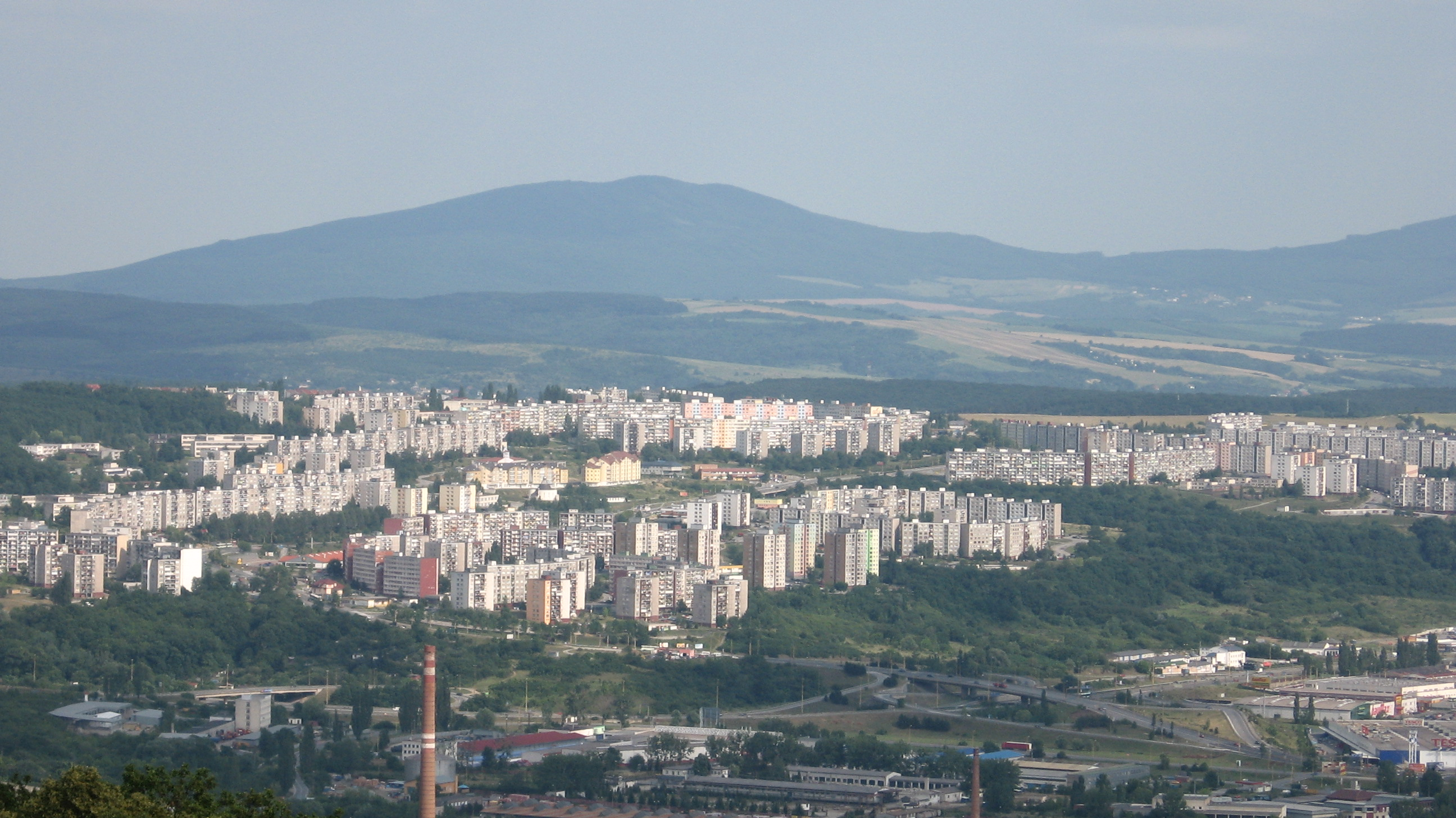 Pohľad na sídlisko Dargovských hrdinov v Košiciach